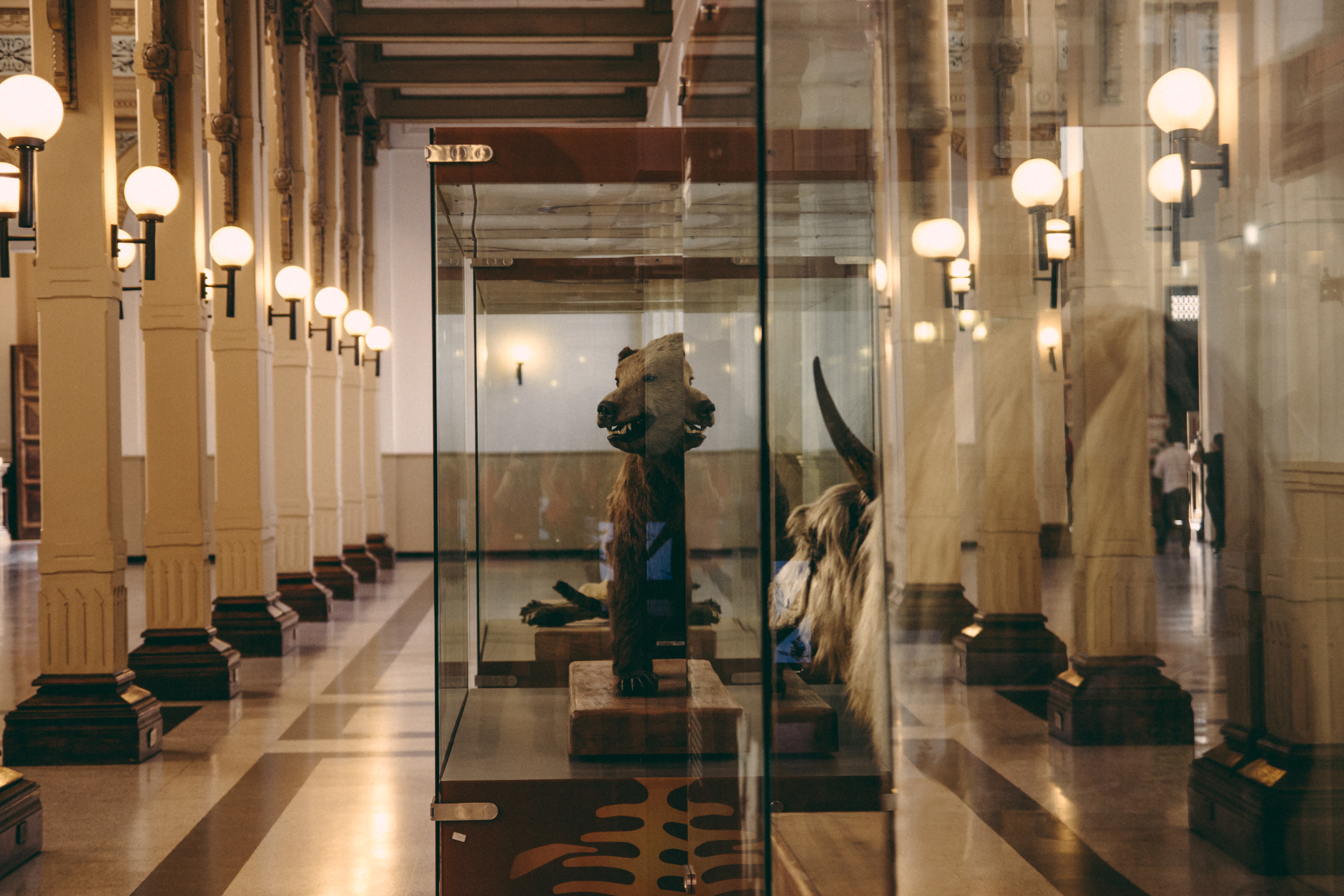 Salón principal MNHN